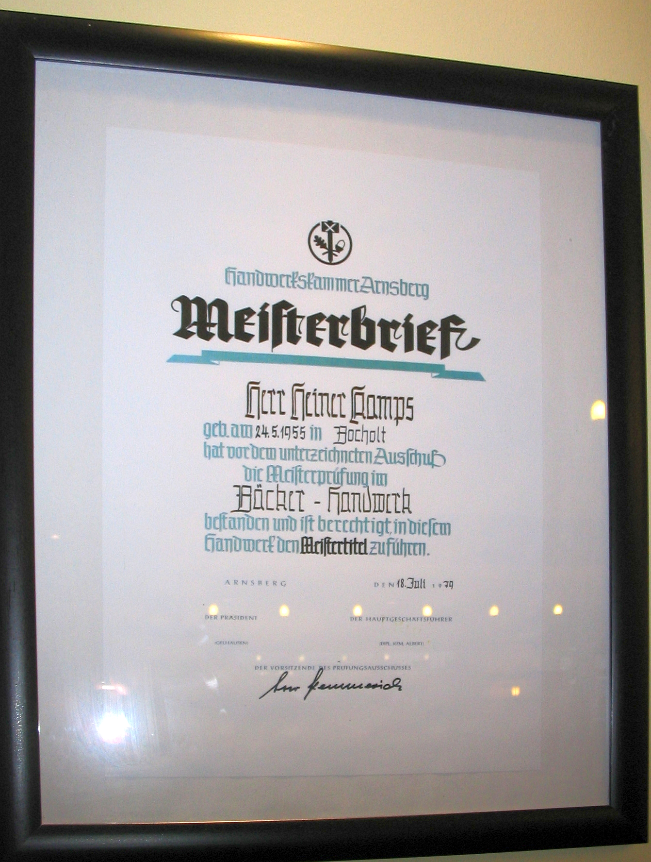 Meisterbrief des späteren Inhabers der Großbäckerei Kamps, Heiner Kamps Handwerkskammer Arnsberg Herrn Heiner Kamps geb. am 24.5.1955 in Bocholt hat vor dem unterzeichneten Ausschuß die Meisterprüfung im Bäcker-Handwerk bestanden und ist berechtigt, in diesem Handwerk den Meistertitel zu führen. Arnsberg den 18. Juli 1979 Der Präsident, Der Hauptgeschäftsführer, Der Vorsitzende des Prüfungsausschusses Unterschriften Aufgenommen in: Café Bastian's Gmbh, Carlsplatz 24, 40213 Düsseldorf (Geschäftsführer: Hiltrud Seggewiß, Dr. Henrik Bauwens)